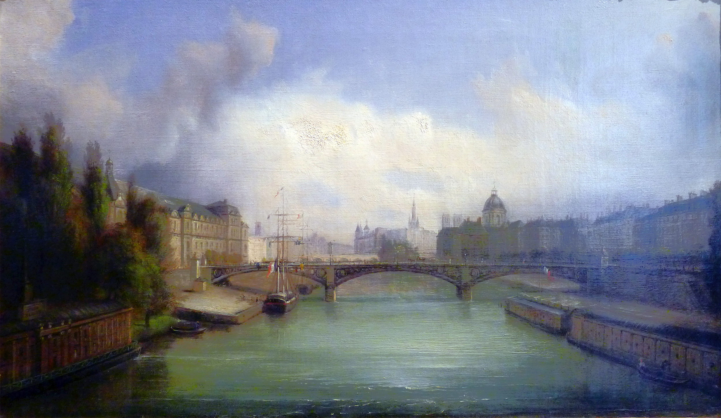 Le pont du Carrousel (appelé aussi pont des Saints-Pères) en 1855 vu prise du pont Royal ; à gauche l’ancien port du Louvre et à droite celui des Saints-Pères.